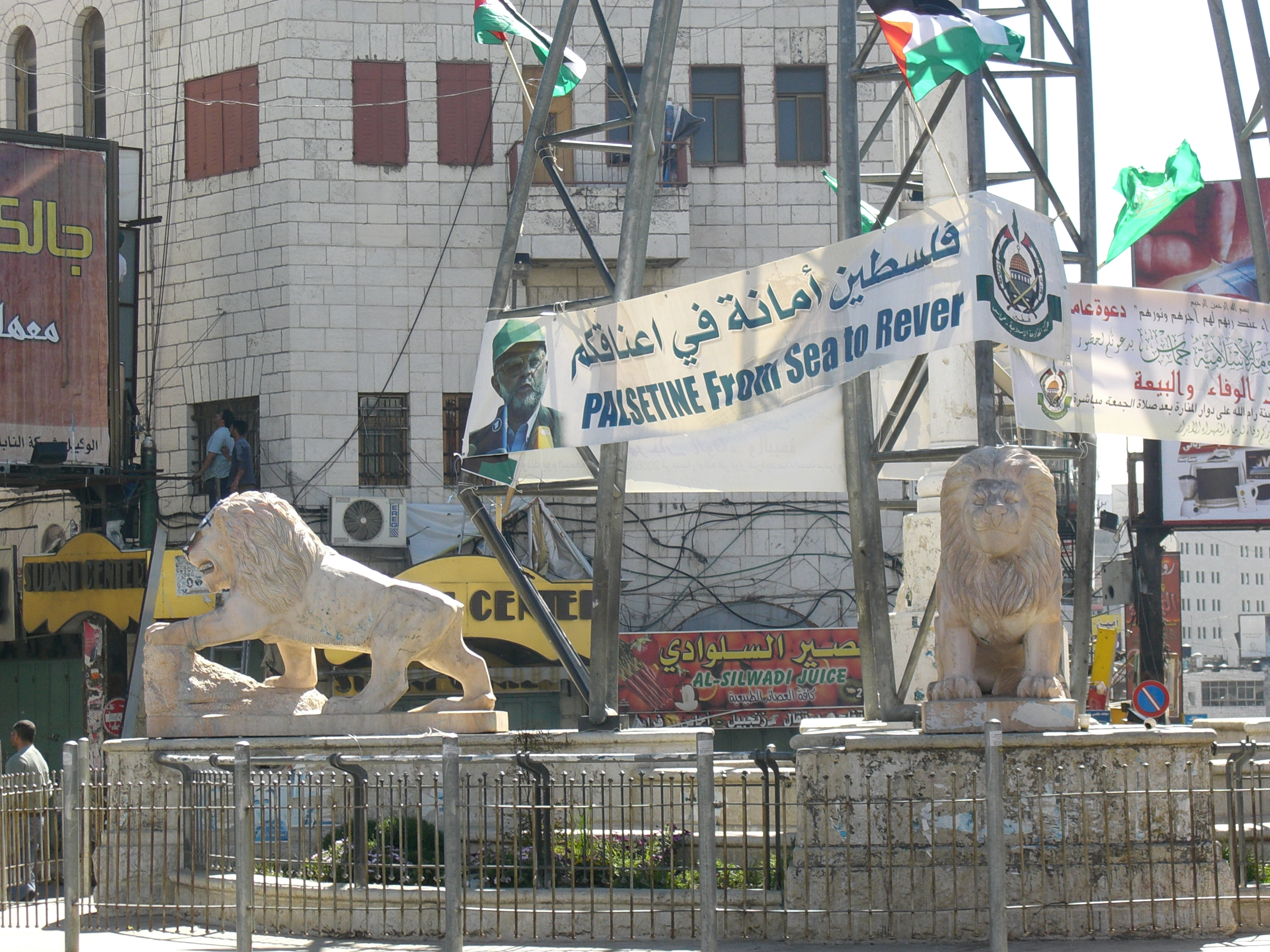 Wahlplakat der Hamas in Ramallah. Auf dem Plakat heiÃŸt es: Palsetine From Sea to Rever (sic!). Gemeint ist, dass Israel von der Landkarte verschwinden muss, damit ein islamischer Gottesstaat zwischen Mittelmeer (Sea) und Jordan-Fluss (River) entstehen kann.